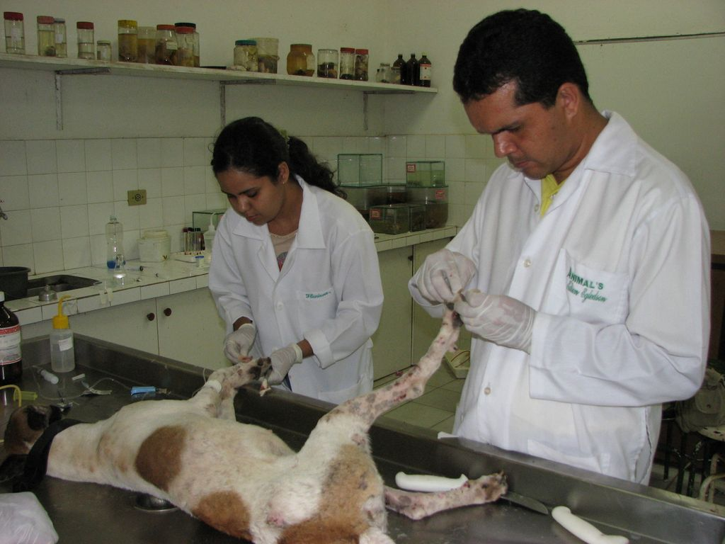 Coleta de material canino para diagnóstico de calazar